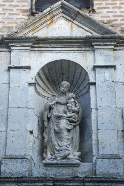 Detalle de la portada principal de la iglesia conventual de la Concepción de Cuéllar